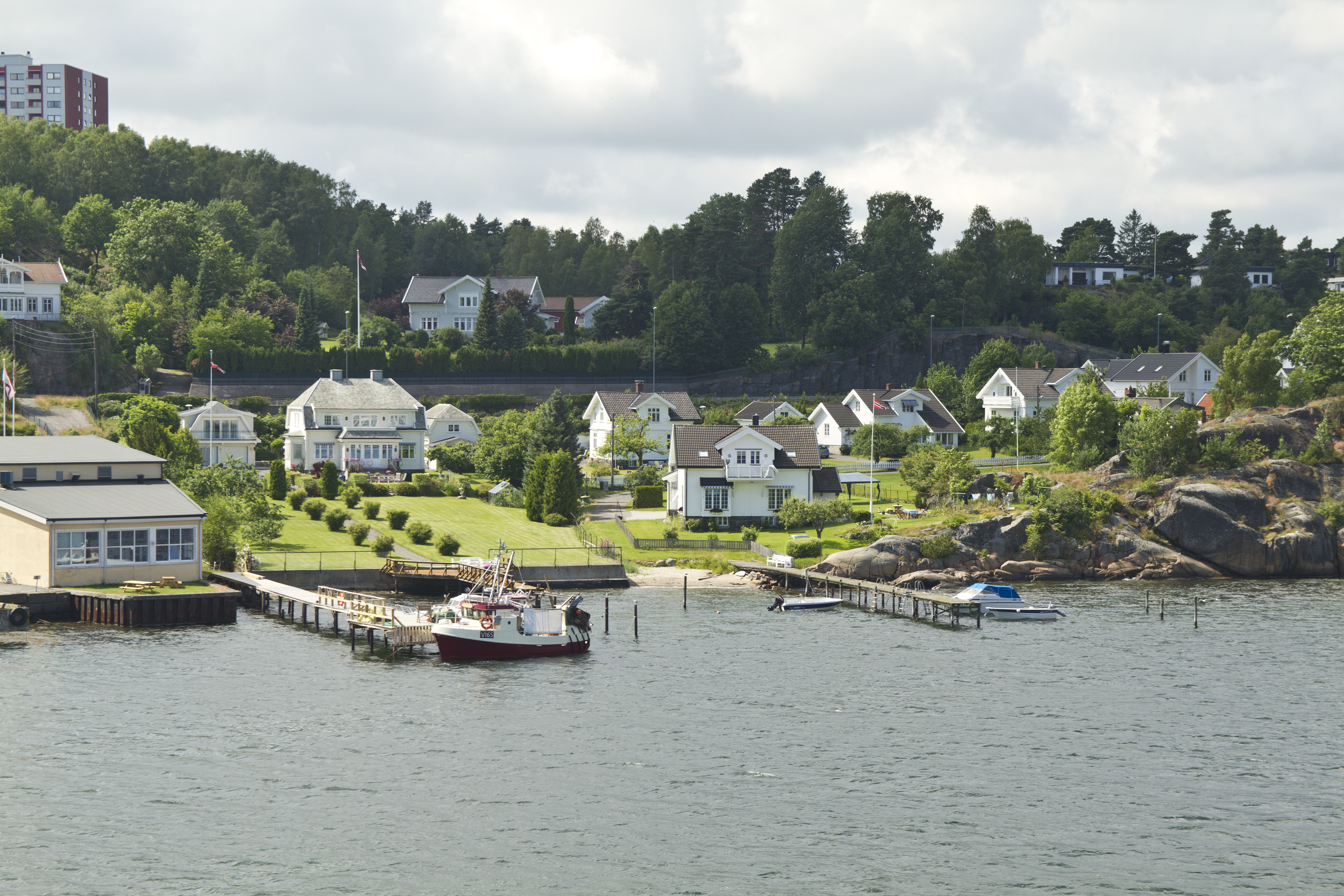 Ommestadkollen, Sandefjord, Vestfold, Norway